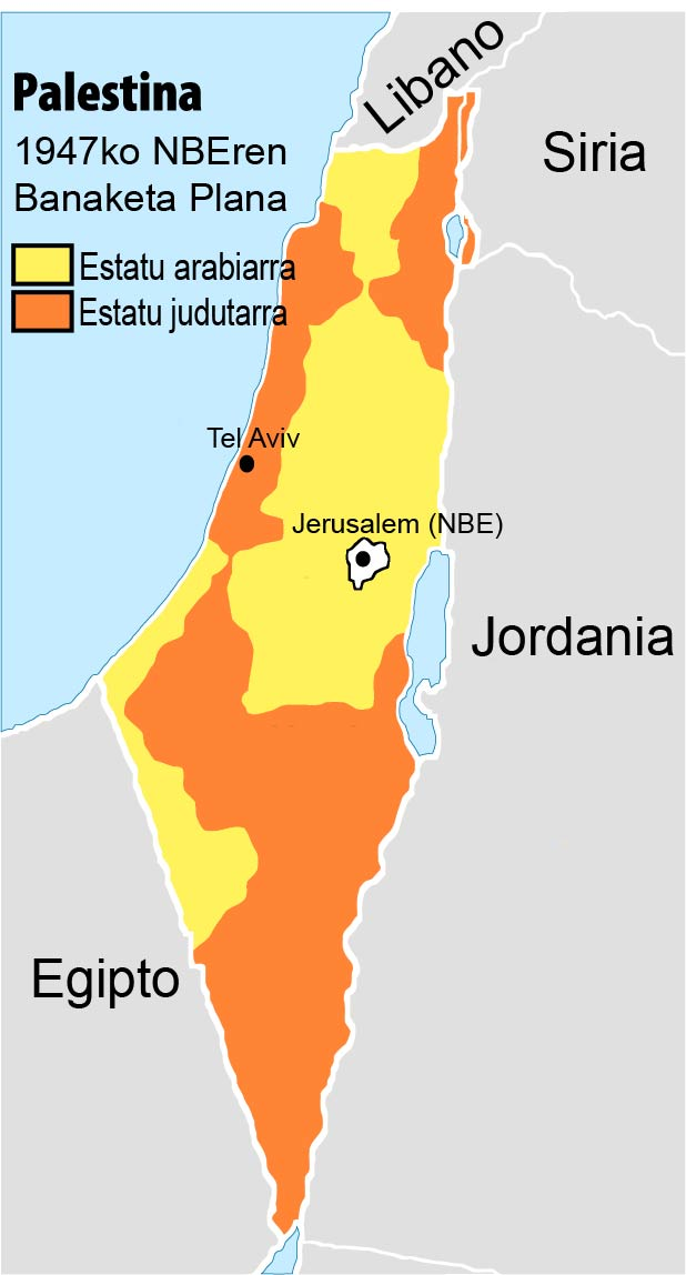 1947. urtean NBEk Palestinako lurraldea banatzeko egin zuen plana.